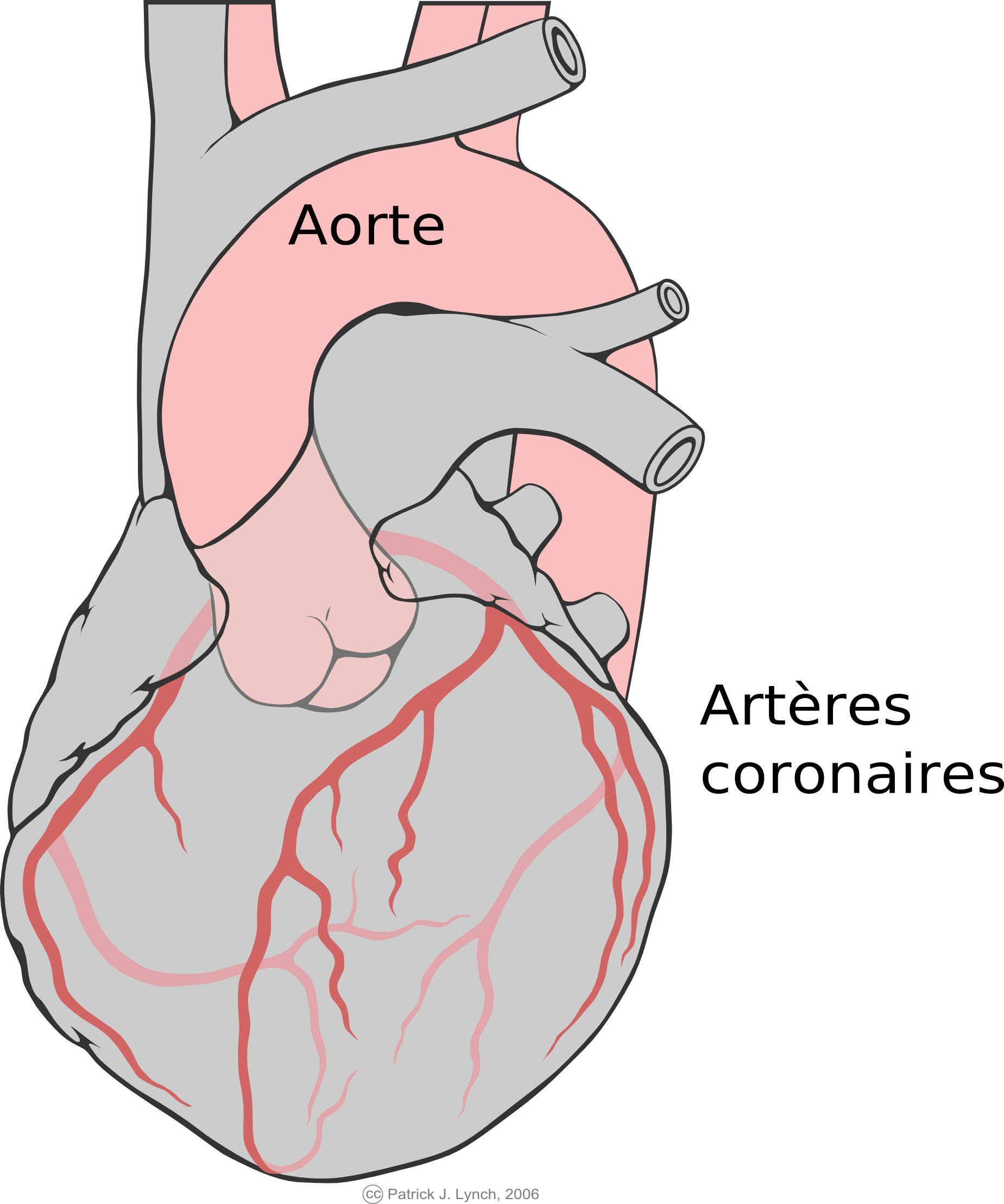 aetère Coronaire